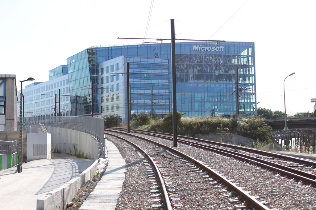 3847646095_fe45b80396_b